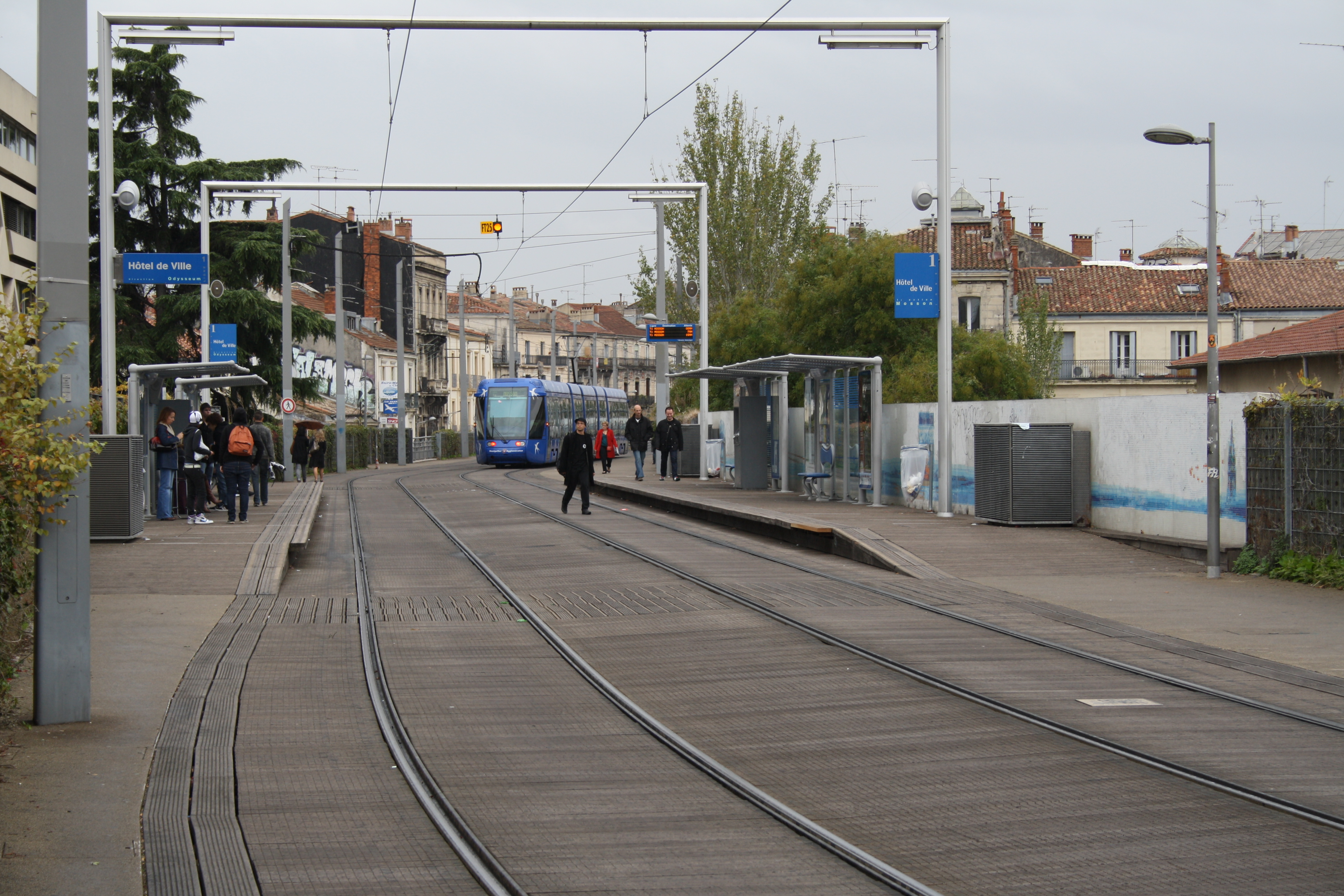 Aufgeständerte Straßenbahnstation in Montpellier